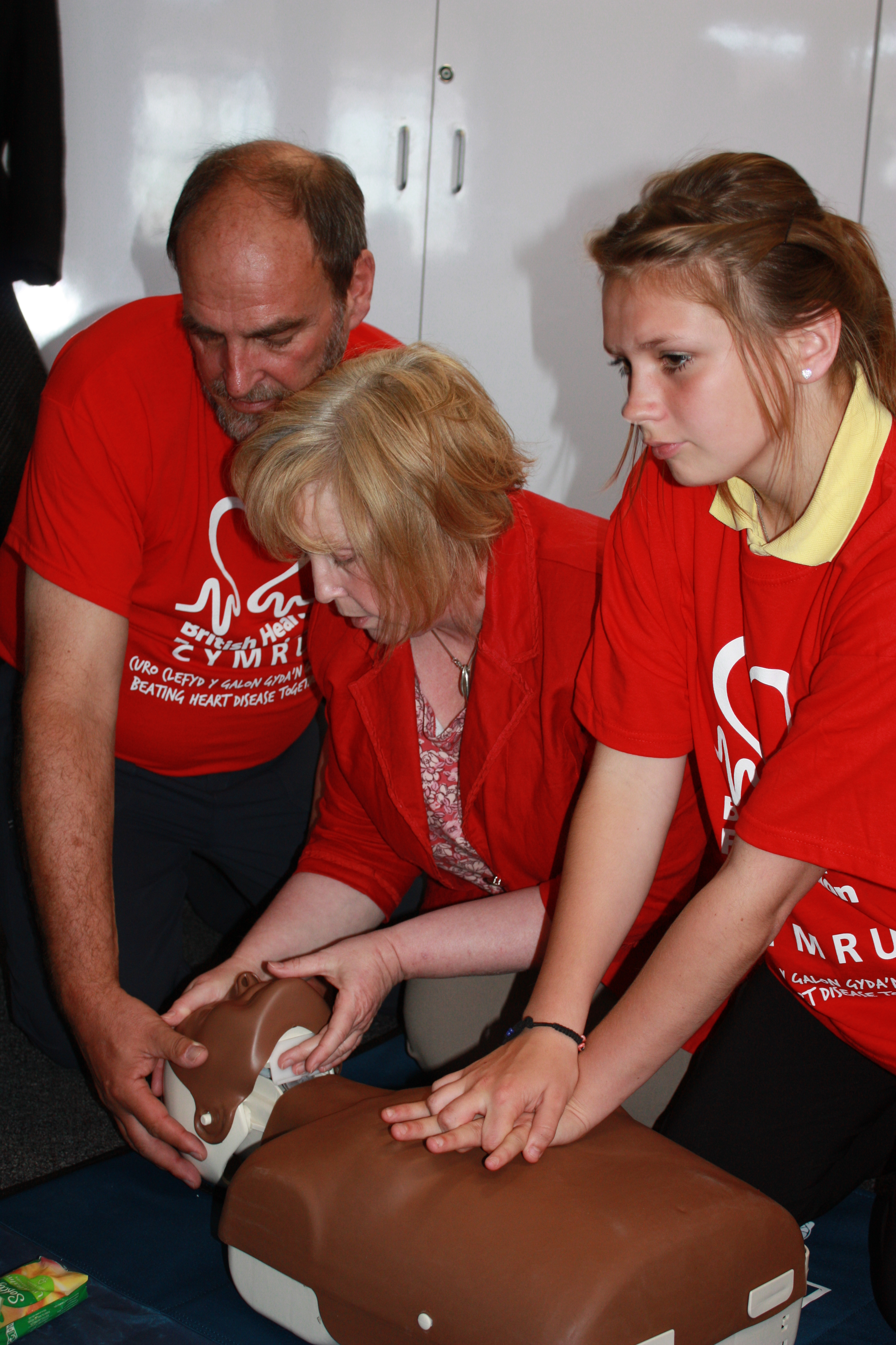 Emergency life support skills demonstration by British Heart Foundation Cymru, 19 June 2012 / Sefydliad Prydeinig y Galon Cymru'n arddangos sgiliau triniaeth cynnal bywyd brys 19 Mehefin 2012